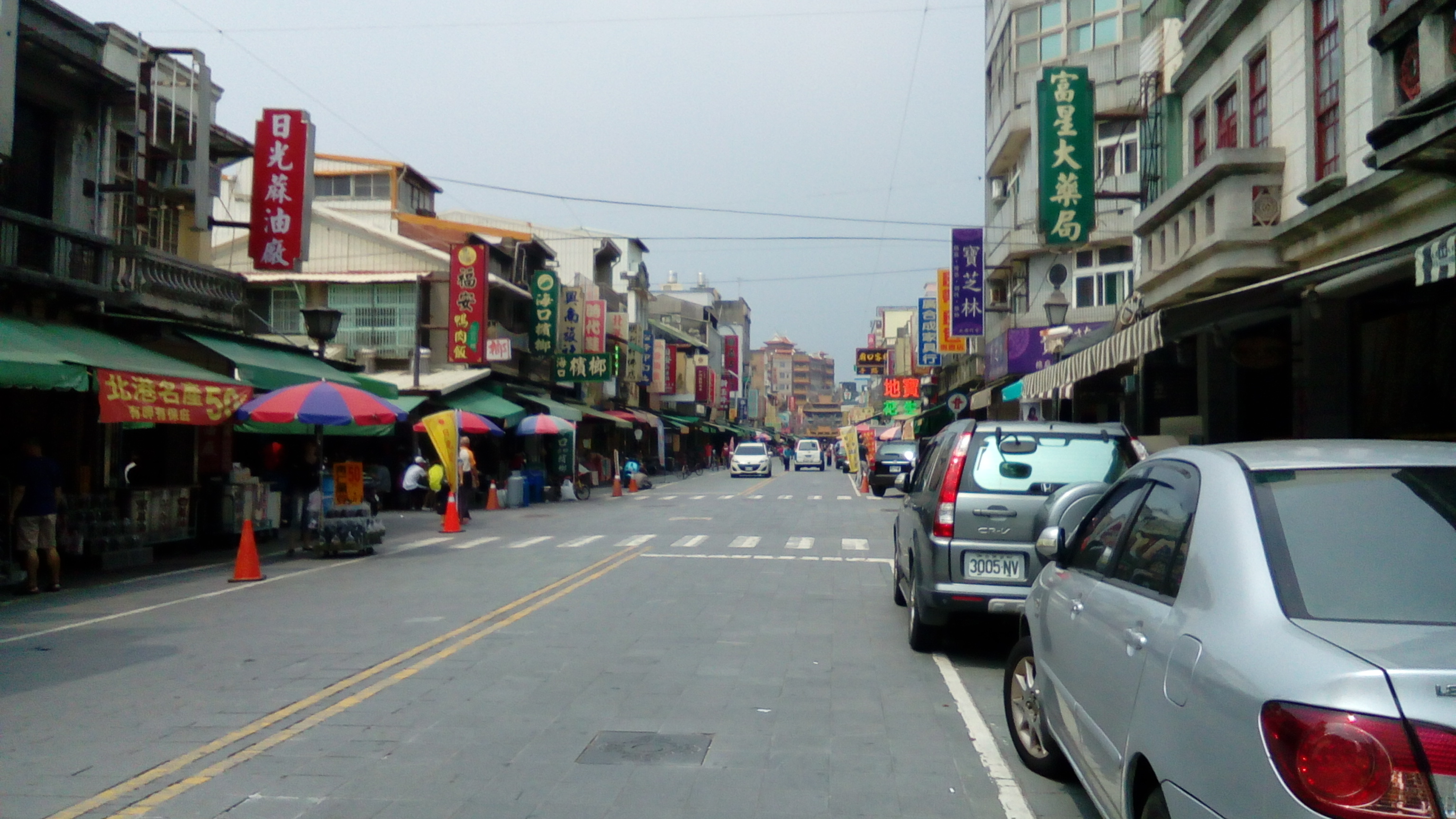 北港市區，遠處為朝天宮